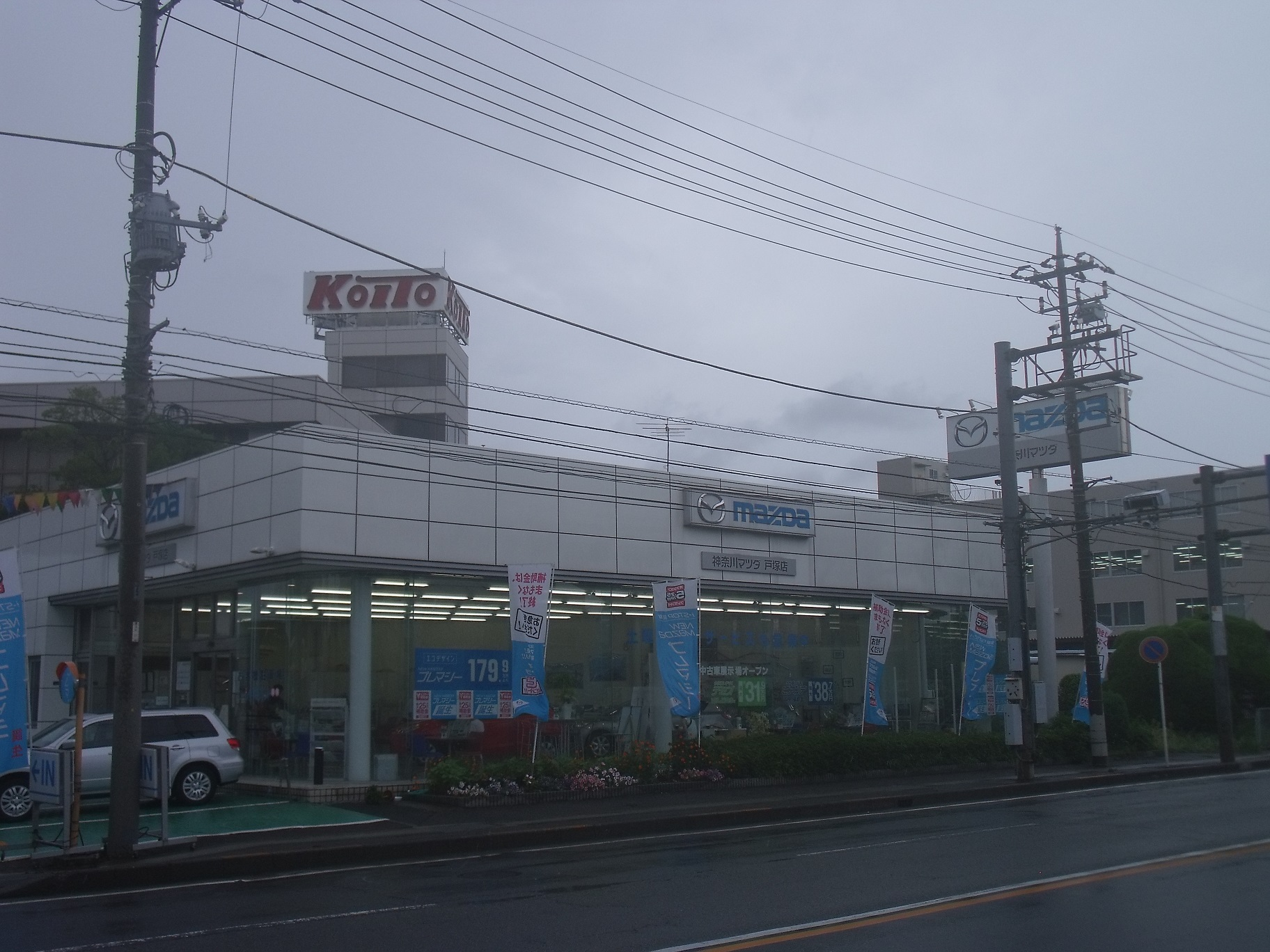 本人による撮影